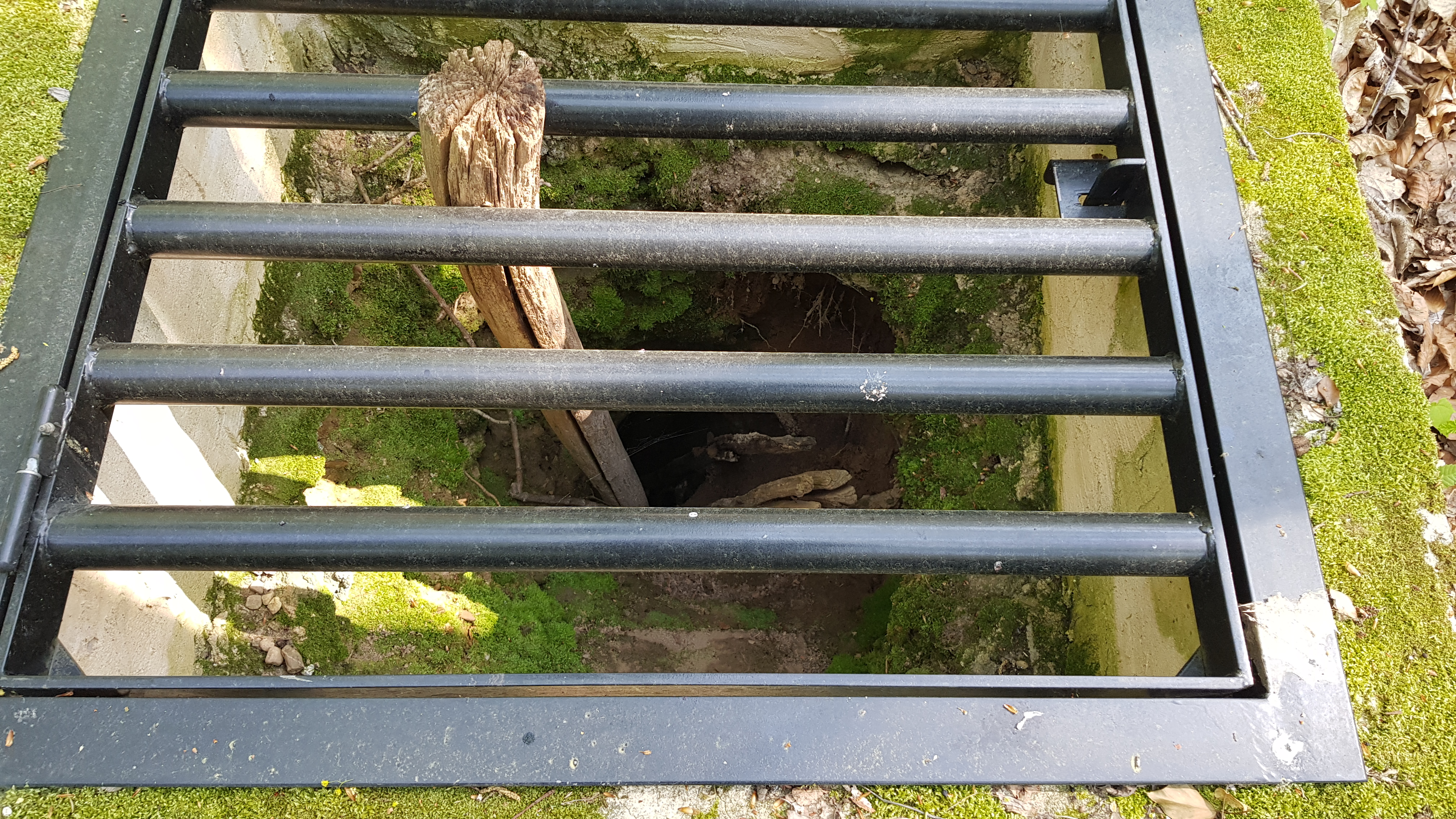 Groeve op de Trichterberg I, Savelsbos, Gronsveld, Nederland